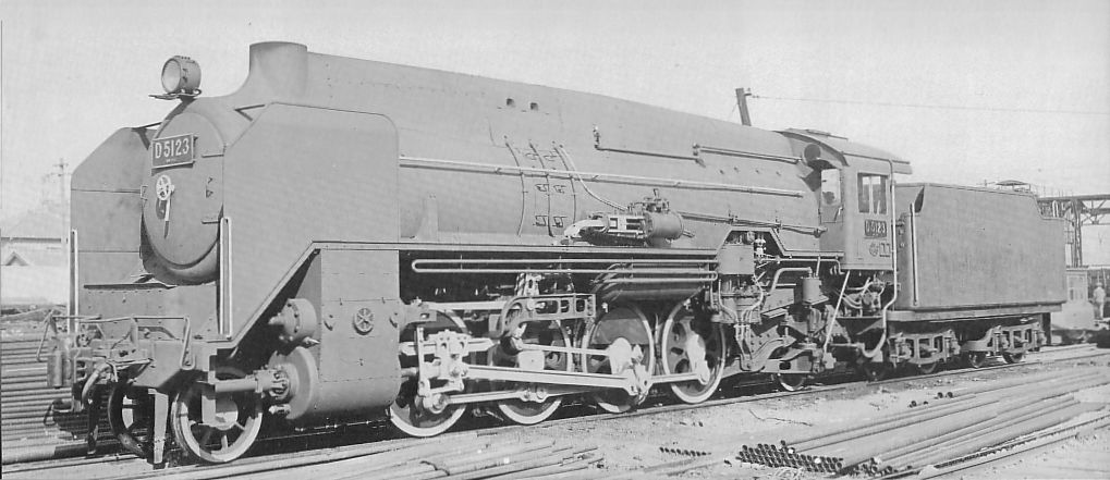 D51形蒸気機関車（23号機）（1936（昭和11）年3月撮影）